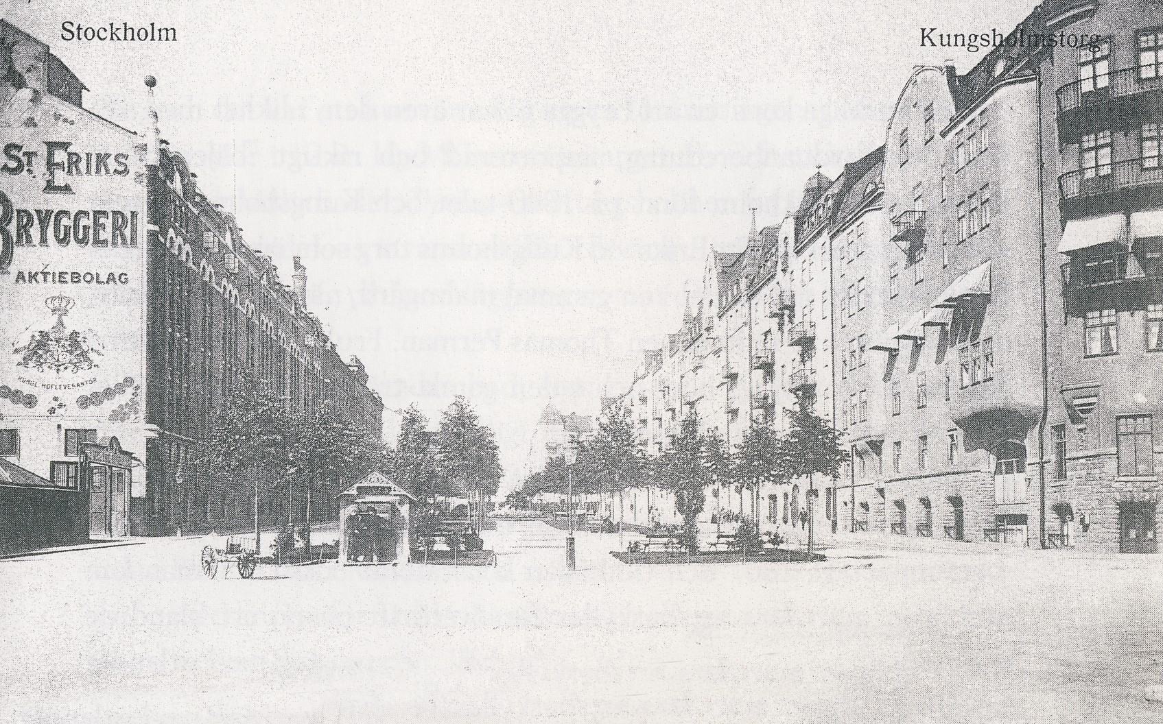 Kungsholmstorg i Stockholm